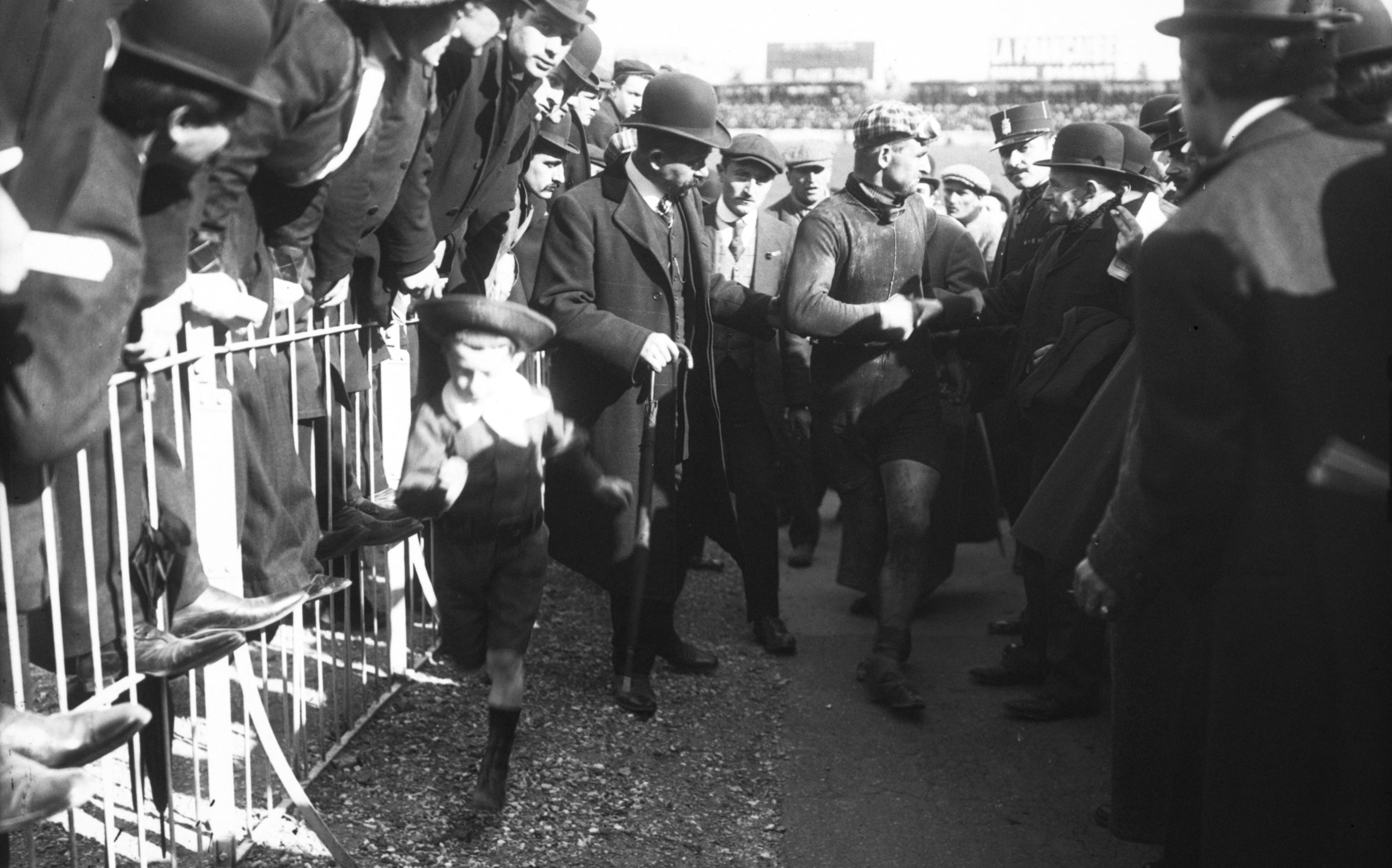 [19e] Bordeaux-Paris 1909, Faber, 4e, félicité à sa rentrée au pesage [cyclisme, arrivée au Parc des Princes, le 2 mai 1909].